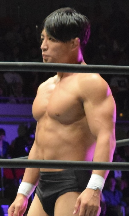 2015年9月27日 ワールド記念ホール「DESTRUCTION in KOBE」 田中翔